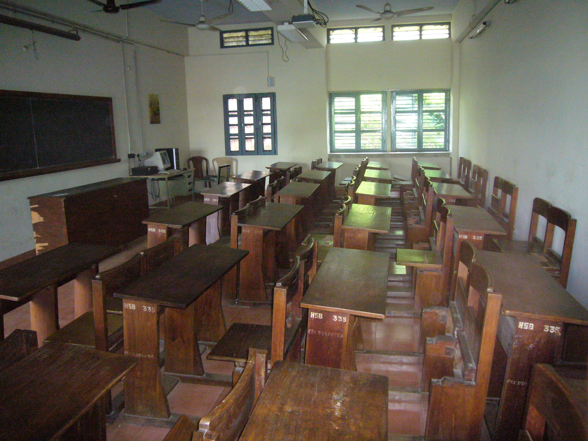 Blick in einen Klassenraum am HS Department am IIT Madras